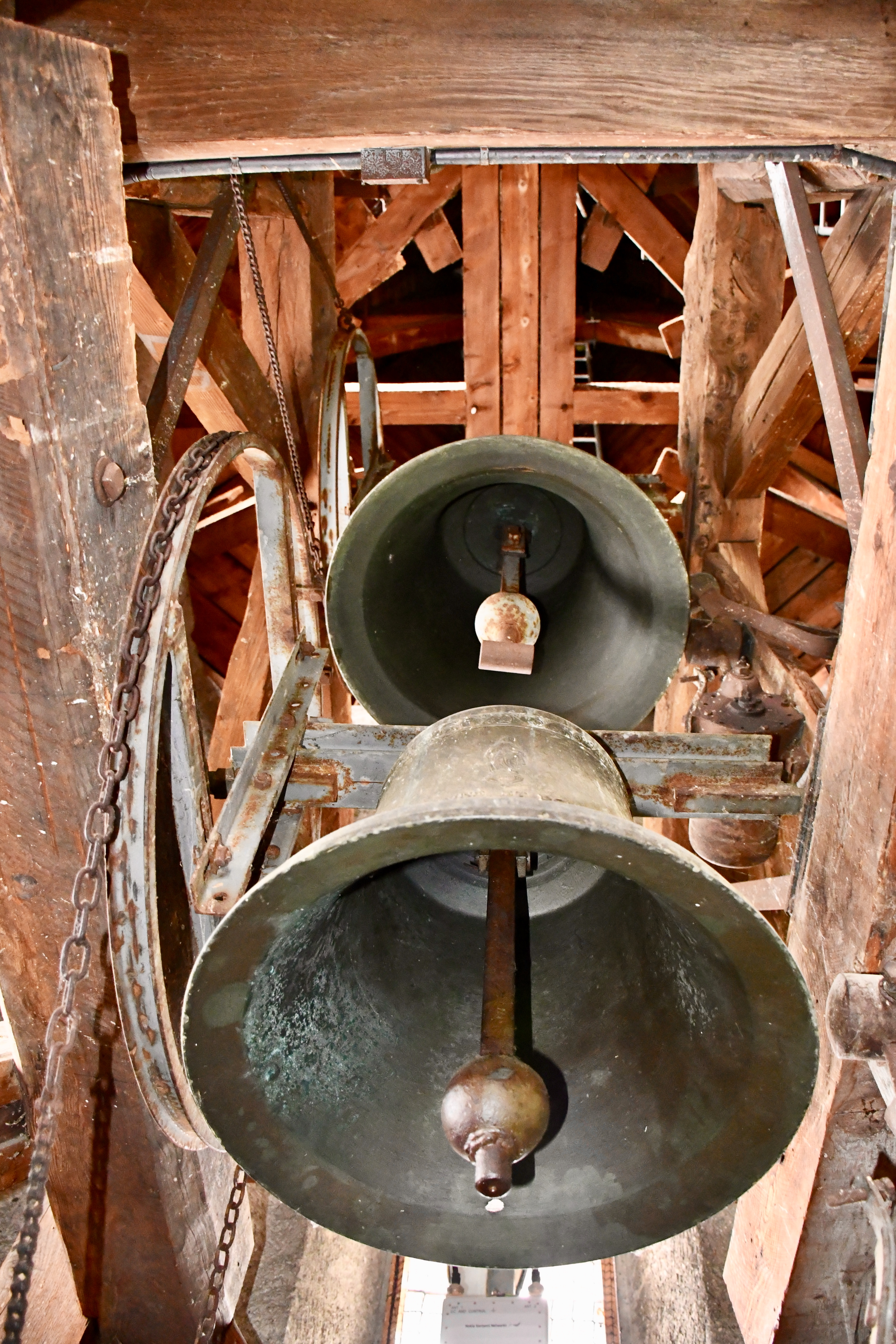 Les cloches « Jean » et « Germaine » de l'église Sainte-Pétronille de Pregny-Chambésy.